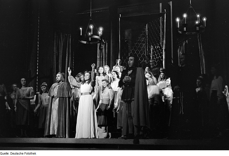 Original image description from the Deutsche Fotothek Szenenbilder